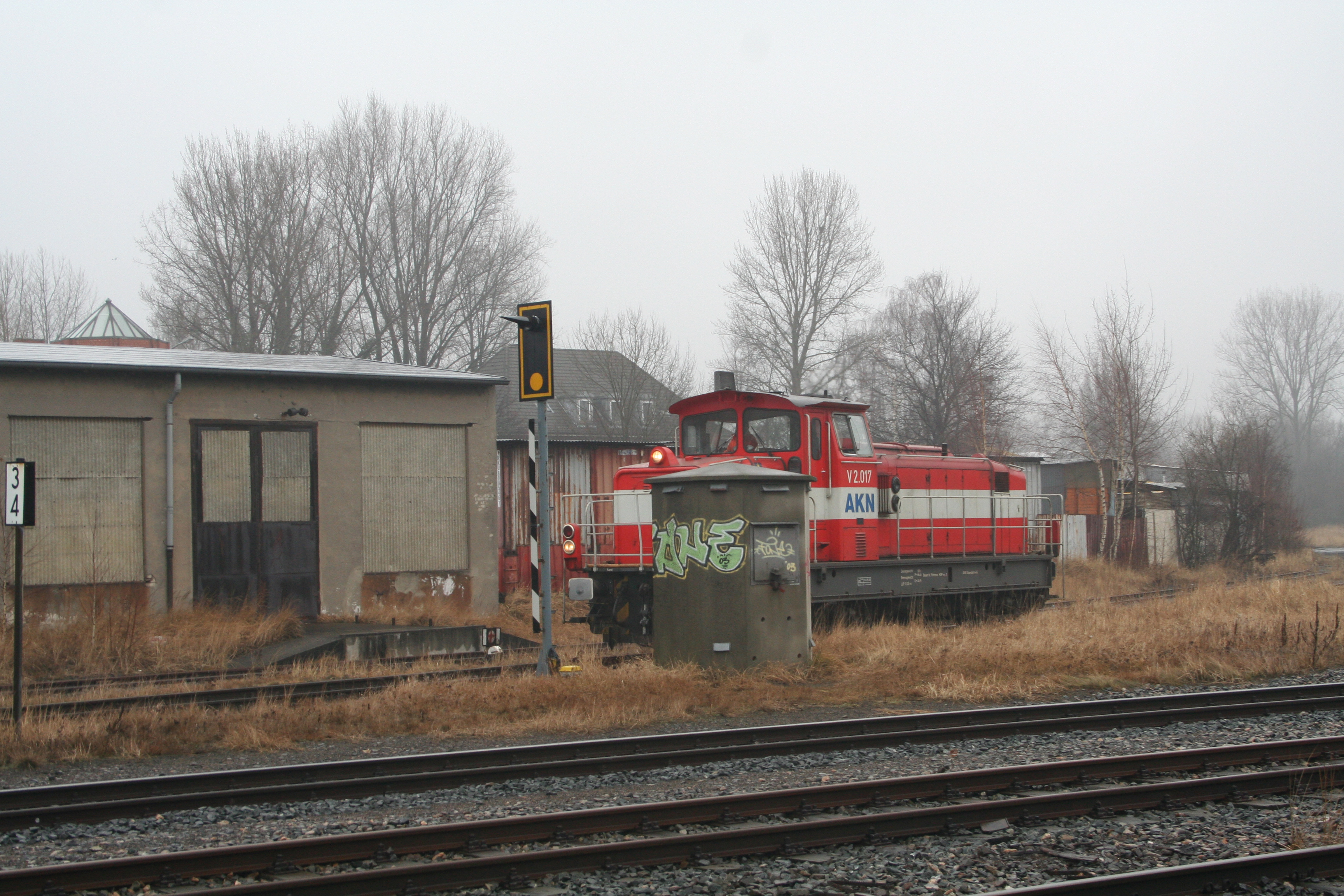 Rangierfahrt im Bereich des Güterbahnhofes Billbrook (zwischen Berzelius- und Liebigstraße), Februar 2009.